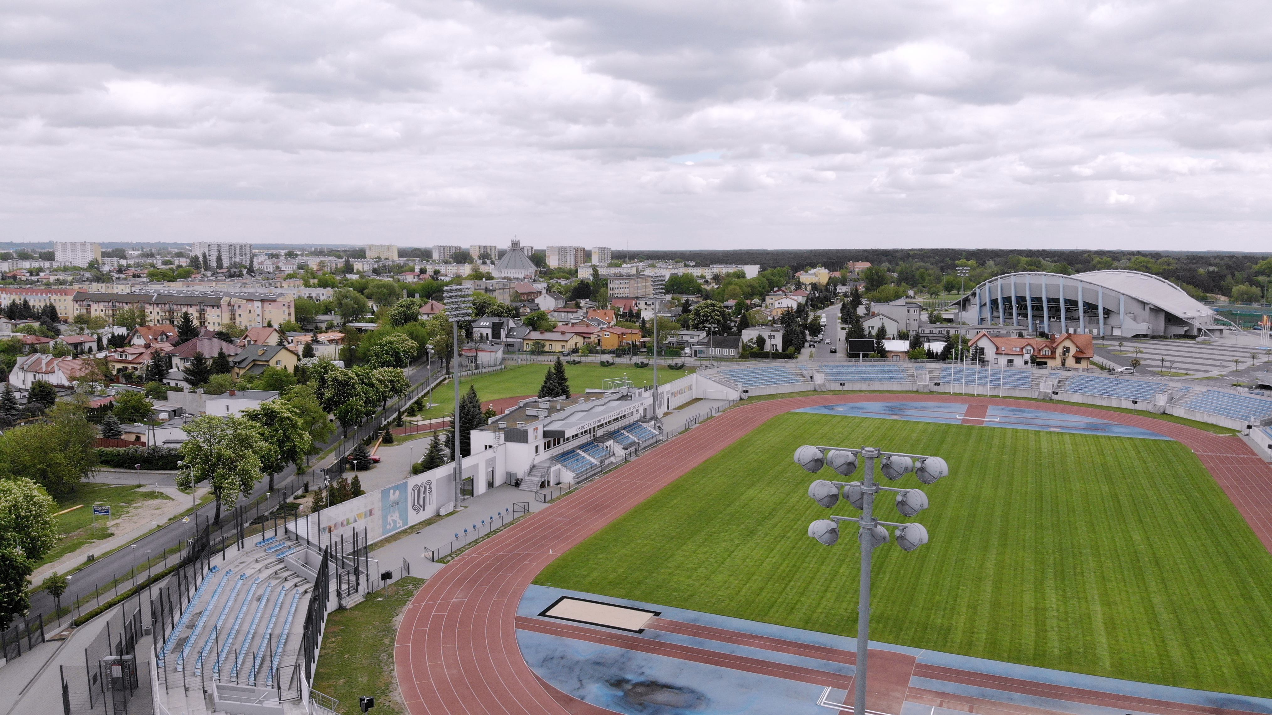 Kazimierza Wielkiego (2020 r.)